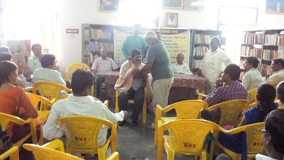 ఖమ్మం సభలో కలిదిండి వర్మ